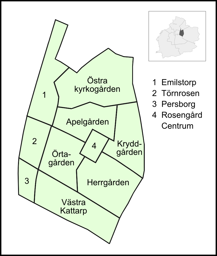 Delområden i Rosengård, Malmö 2009